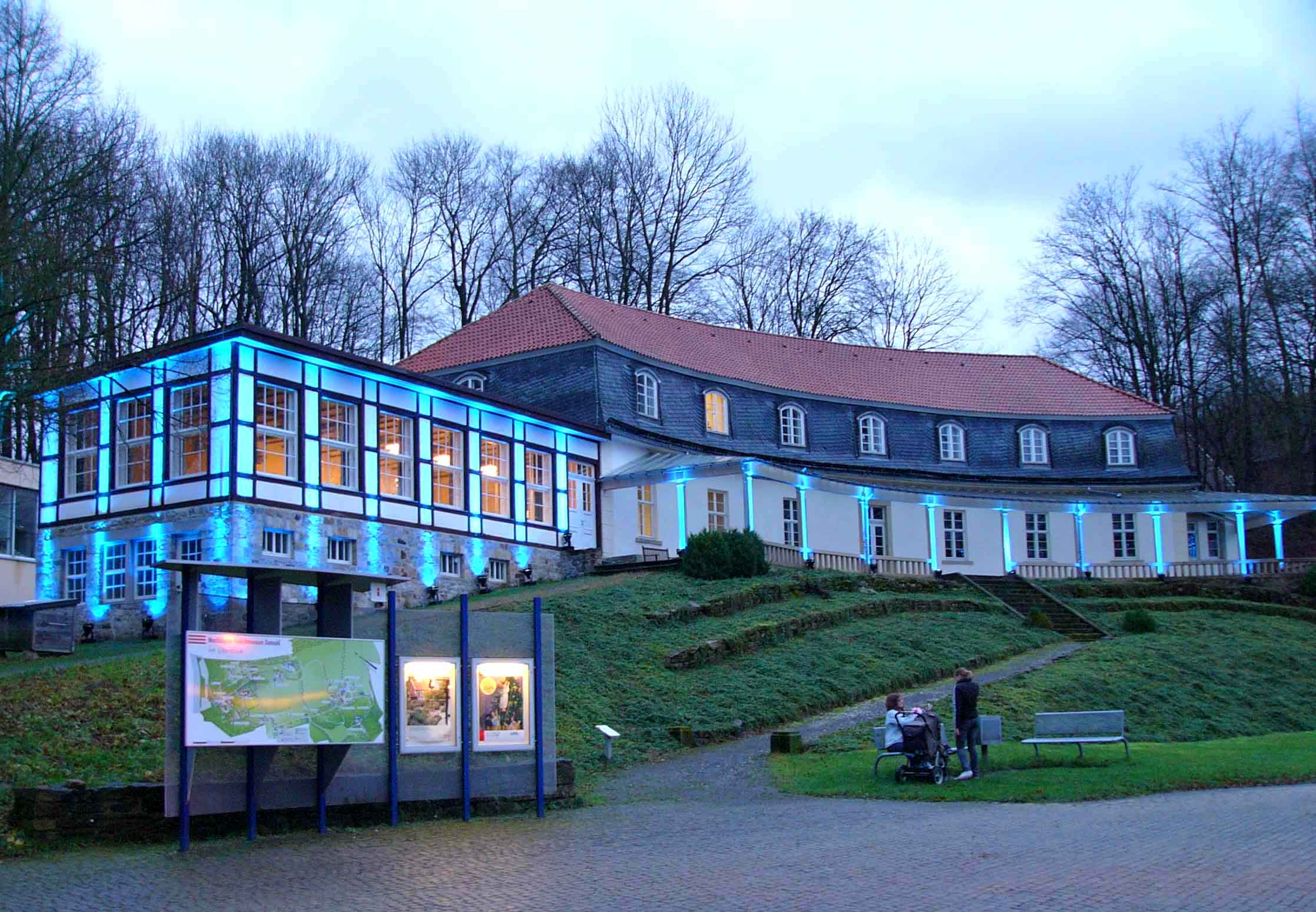 Krummes Haus in Detmold, Germany